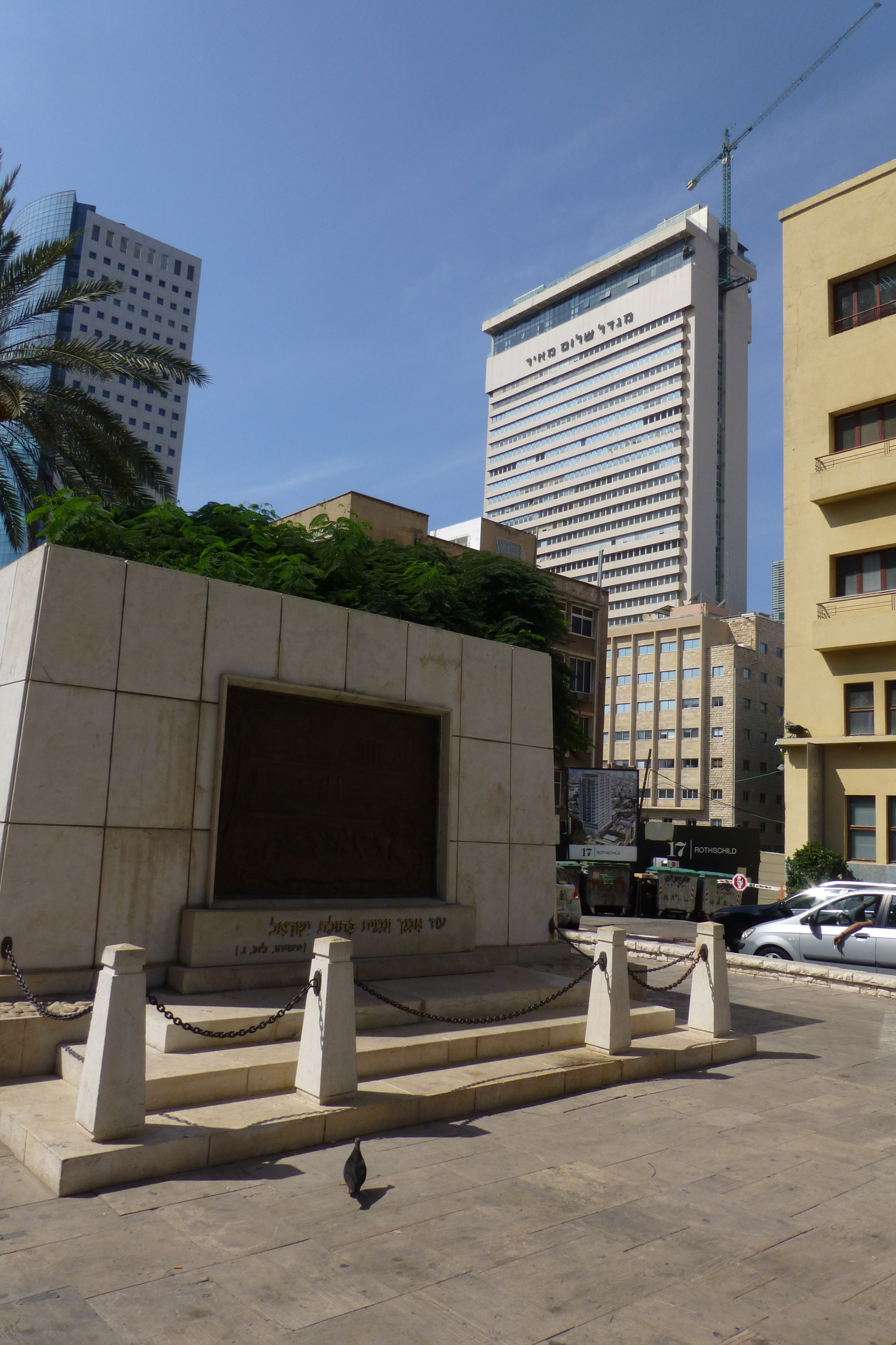 שדרות רוטשילד היו בין ארבעת הרחובות הראשונים של תל אביב (שנקראה אז "אחוזת בית"), שנחנכו לאחר רחוב הרצל (הרחוב הראשון בעיר), ובניצב אליו. הרחובות נסללו על גבי דיונות חול אשר יושרו ושוטחו, ולאורכם נבנו בתיה הראשונים של העיר. התוואי שהפך להיות השדרה היה ואדי קטן שאותו קשה היה ליישר באמצעים של אז, ואליו גם התנקזו מים רבים בחורף. בשל כך הוחלט למלאו בחול להשאירו כשטח פתוח שעליו לא ייבנו בתים אלא בצדיו, כרחוב עירוני רחב יותר. בט"ו בשבט ה'תר"ע (1910) החלו נטיעות בשטח פתוח זה, במטרה להפוך את הרחוב לשדרה הראשונה של העיר. חודשים אחדים לאחר מכן, בדצמבר 1910, החליט ועד אחוזת בית לקרוא לשדרה על שם הברון רוטשילד, ולמנות את מרדכי בן הלל הכהן ואת מאיר דיזנגוף להודיע על כך באופן רשמי לברון. אנשי אחוזת בית ראו בשדרה את תחילתה של שדרה מפוארת כדוגמת הבולווארים המפוארים של פריז.